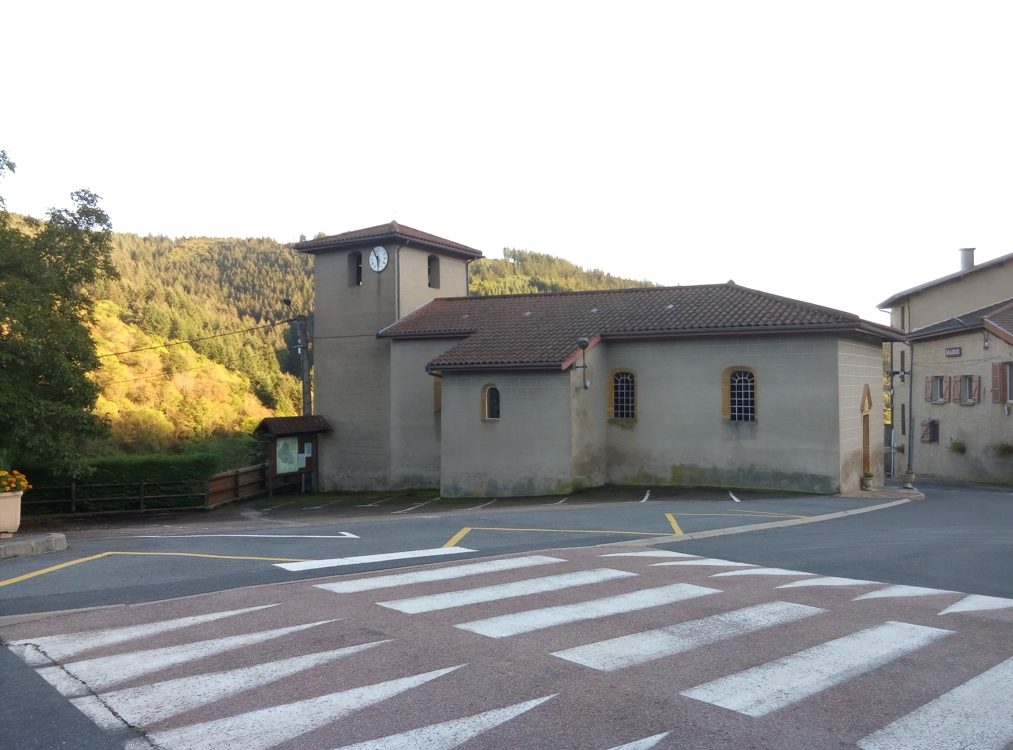 Église de Dième, dans le département du Rhône.